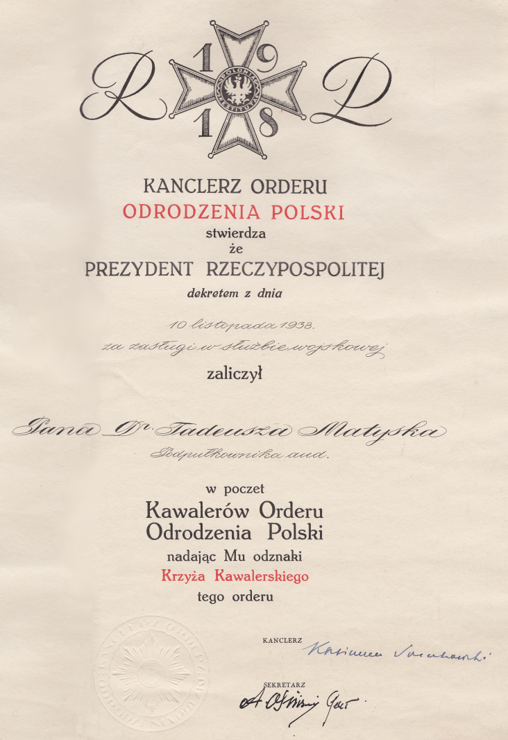 Tadeusz Matysek - dokument przyznania Krzyża Kawalerskiego Orderu Odrodzenia Polski